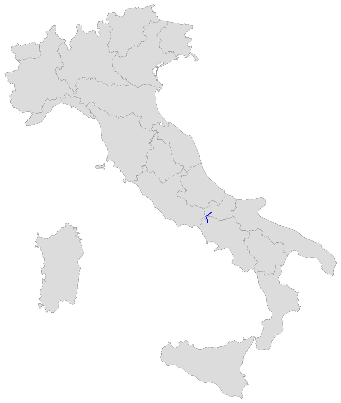 Percorso della SS 85 Venafrana